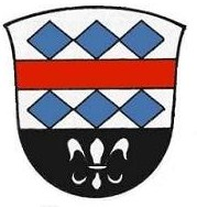 Logo von